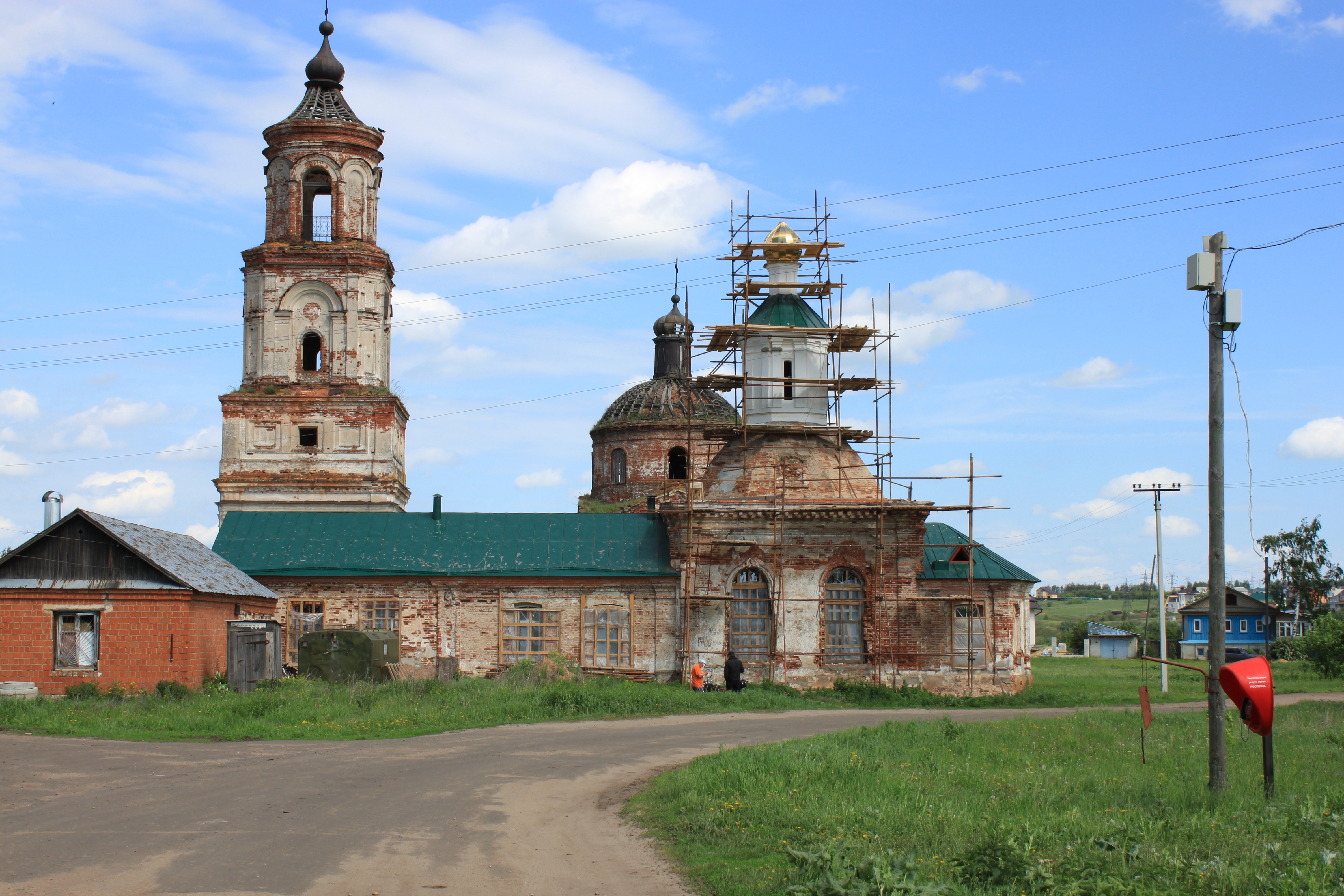 Заречное Арзамасский район. Церковь Михаила Архангела